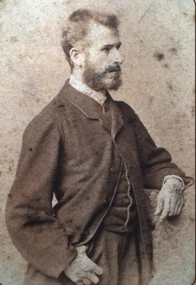 Porträtfotografie von Ferdinand Lindner